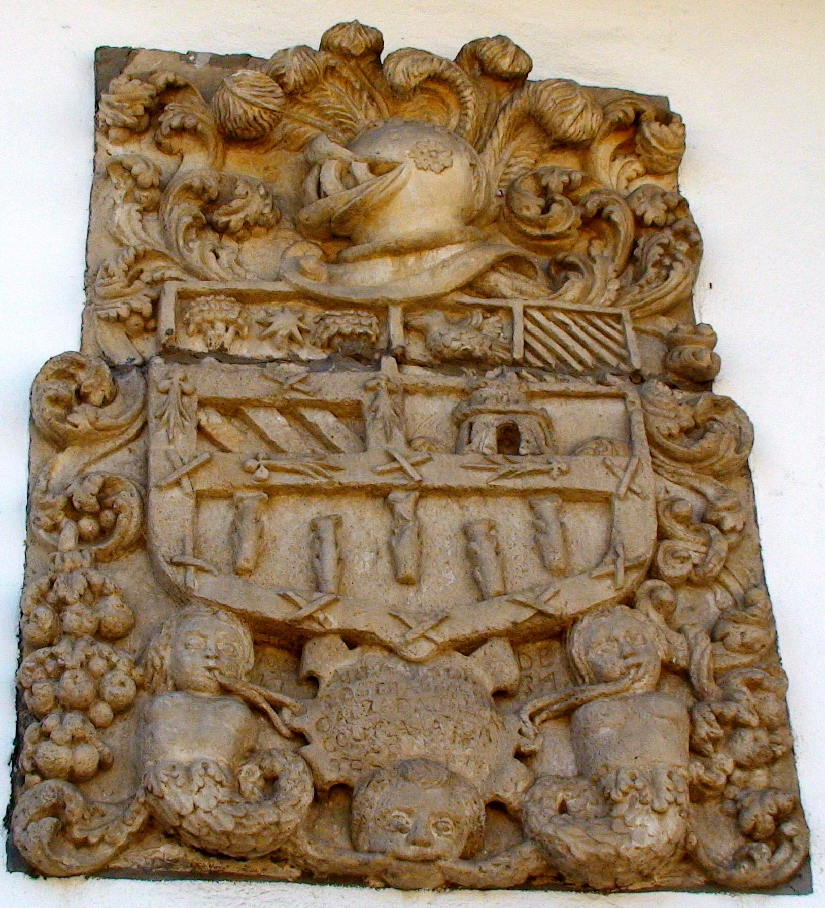 Escudo heráldica